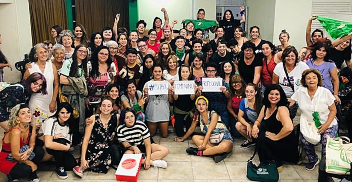 La Mesa Ni Una Menos Santa Fe hizo público su apoyo a la futbolista Macarena Sanchez Jeanney ante la amenaza de muerte recibida el pasado sábado.